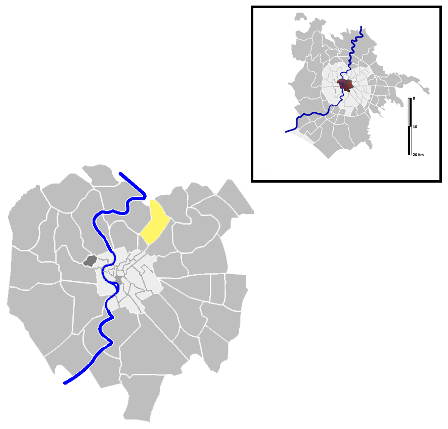 Trieste